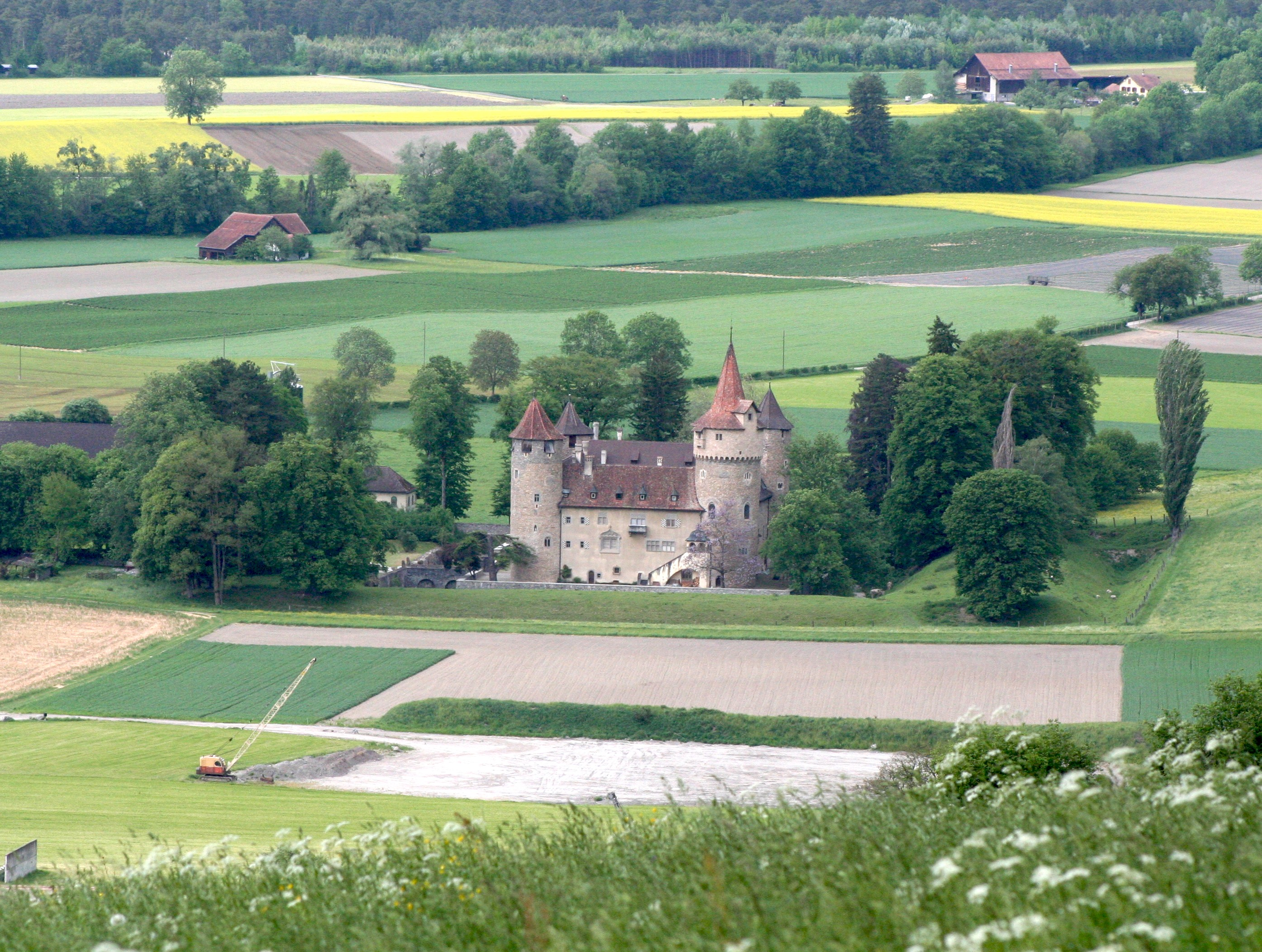 Schloss Marschlins, Ansicht von Süden